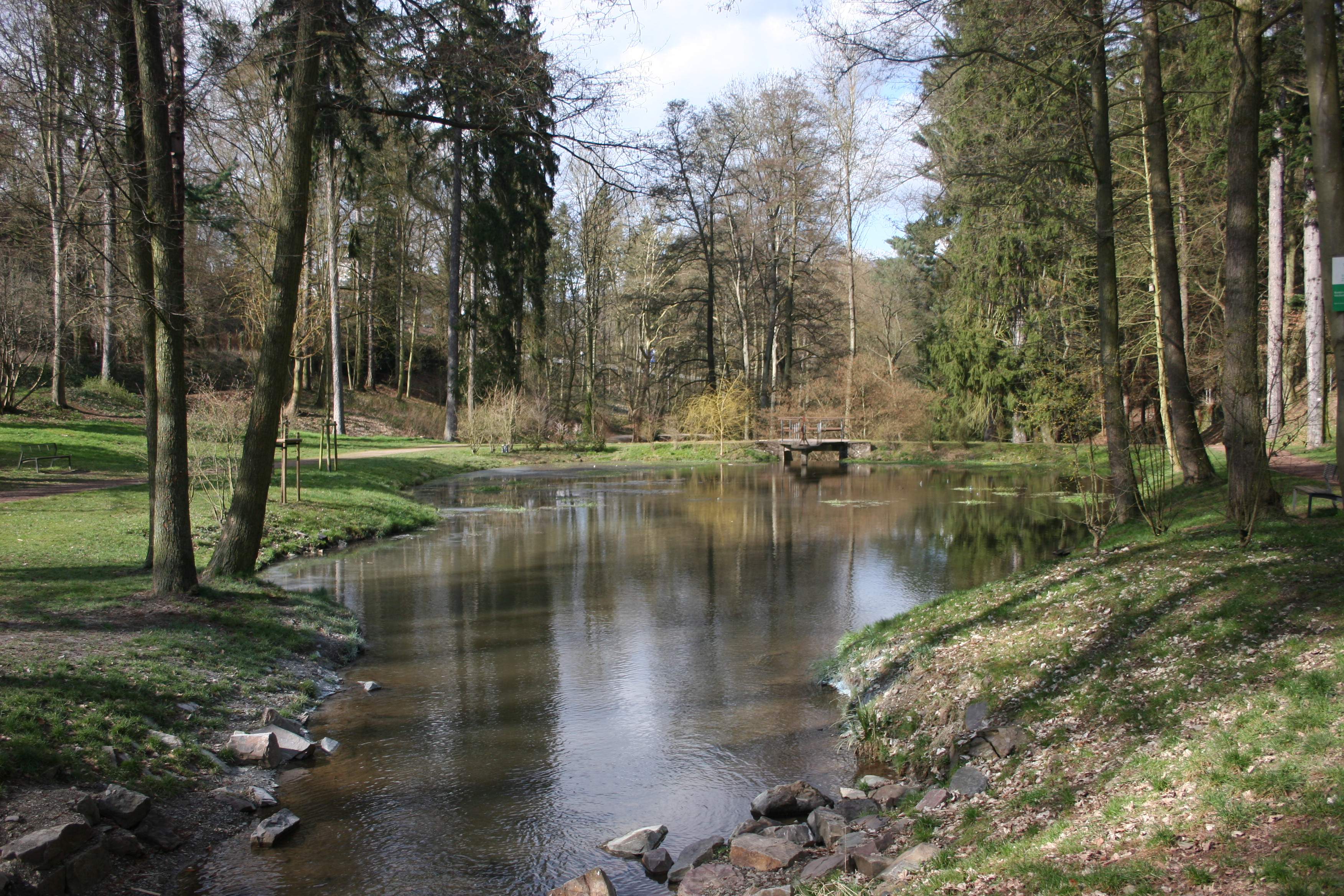 Kloster Marienberg, Park